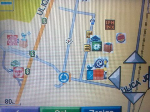 Przykładowe POI wyświetlane w nawigacji Garmin